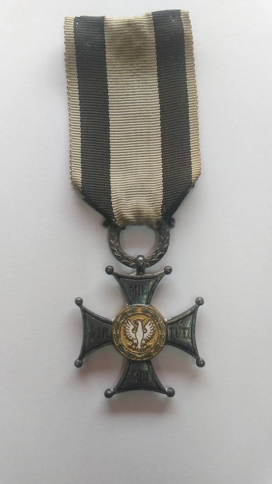 Awers orderu Virtuti Militari